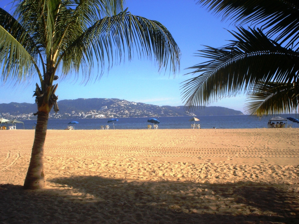 Área 'Tamarindos' de la playa Hornos en Acapulco, Guerrero, México.